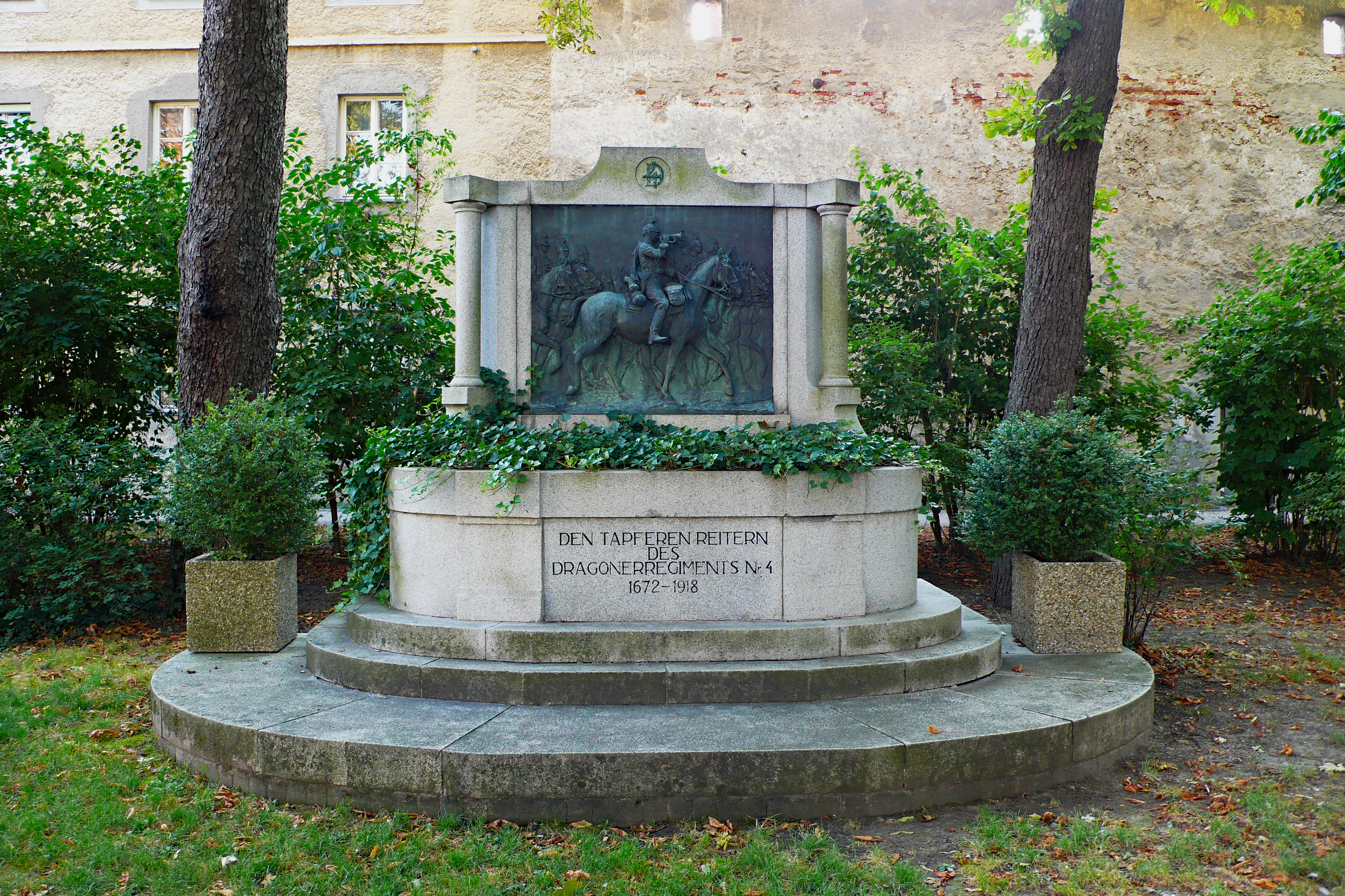 Denkmal für das Dragonerregiment Nr. 4 im Pollheimer Park, Wels, Oberösterreich.